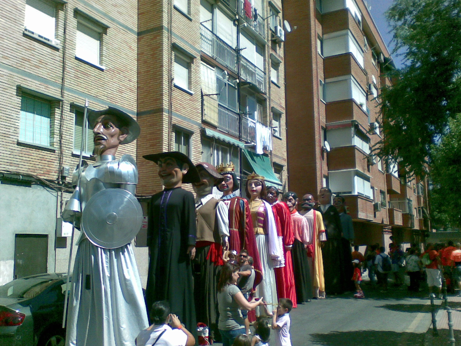 Gigantes de Alcalá de Henares